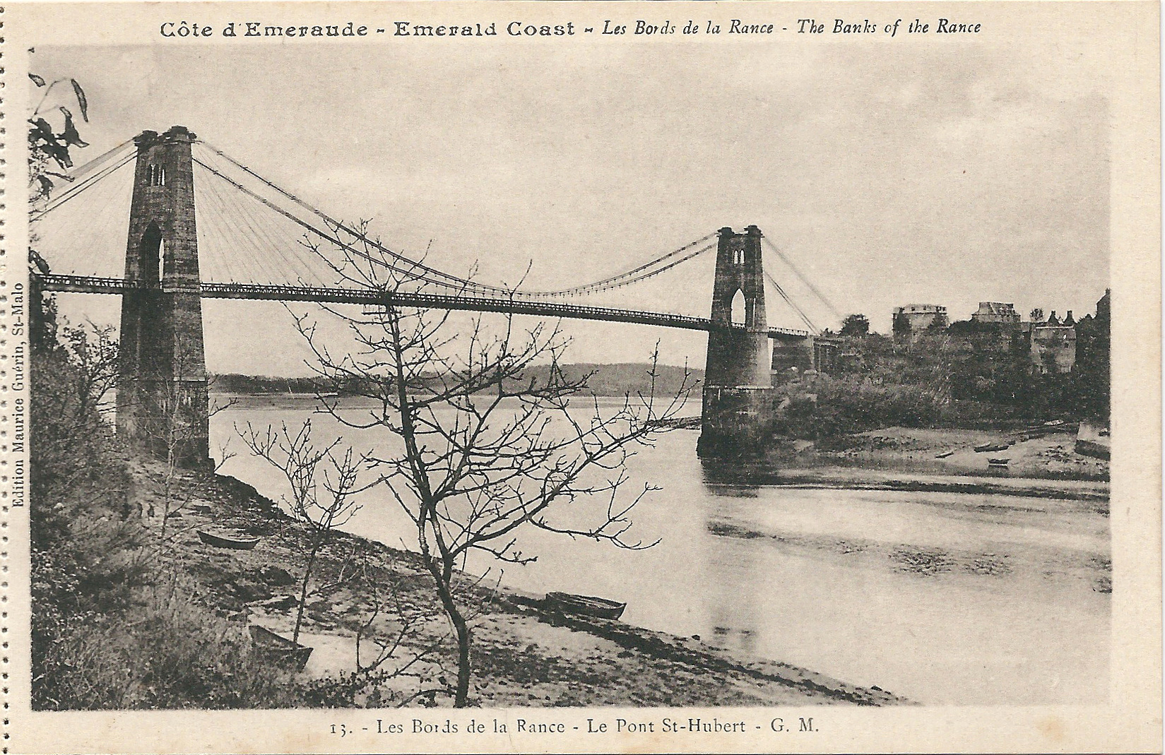 Carte postale des bords de la Rance (Ille-et-Vilaine, France) vers 1920